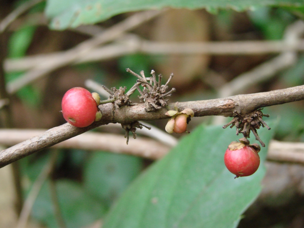 Doliocarpus brevipedicellatus Garcke - DILLENIACEAE - Parque Ecológico dos Jequitibás - Sobradinho - Distrito Federal - Brasil.